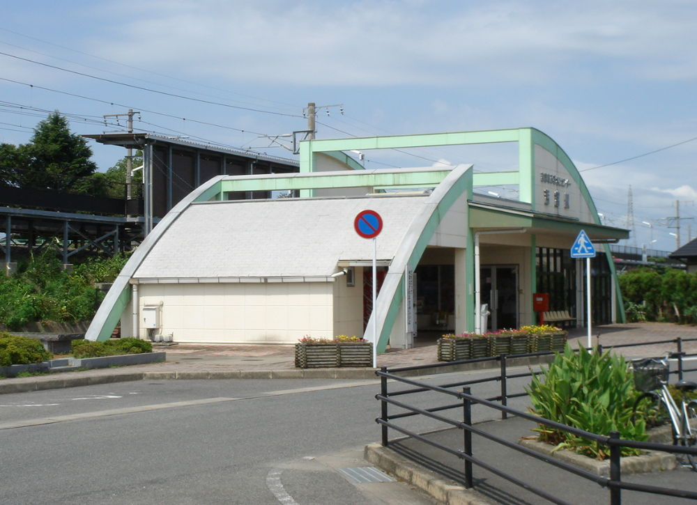 日豊本線吉富駅